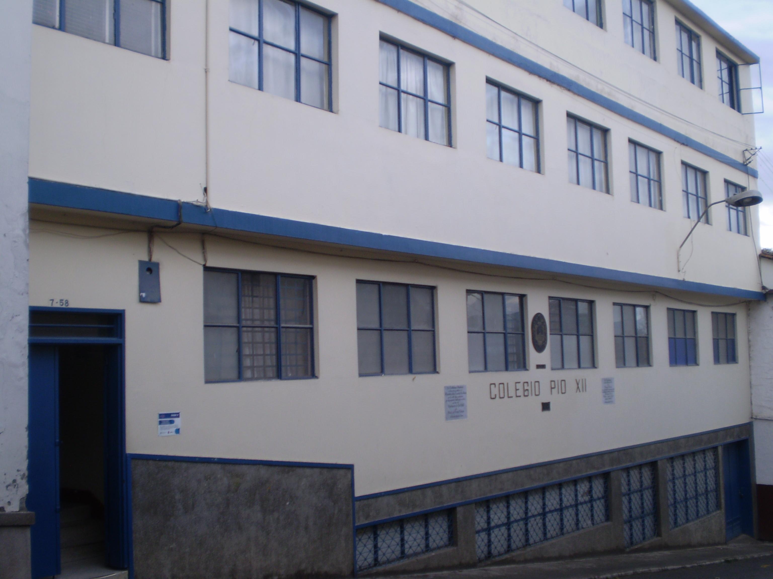 Colegio importante de salamina